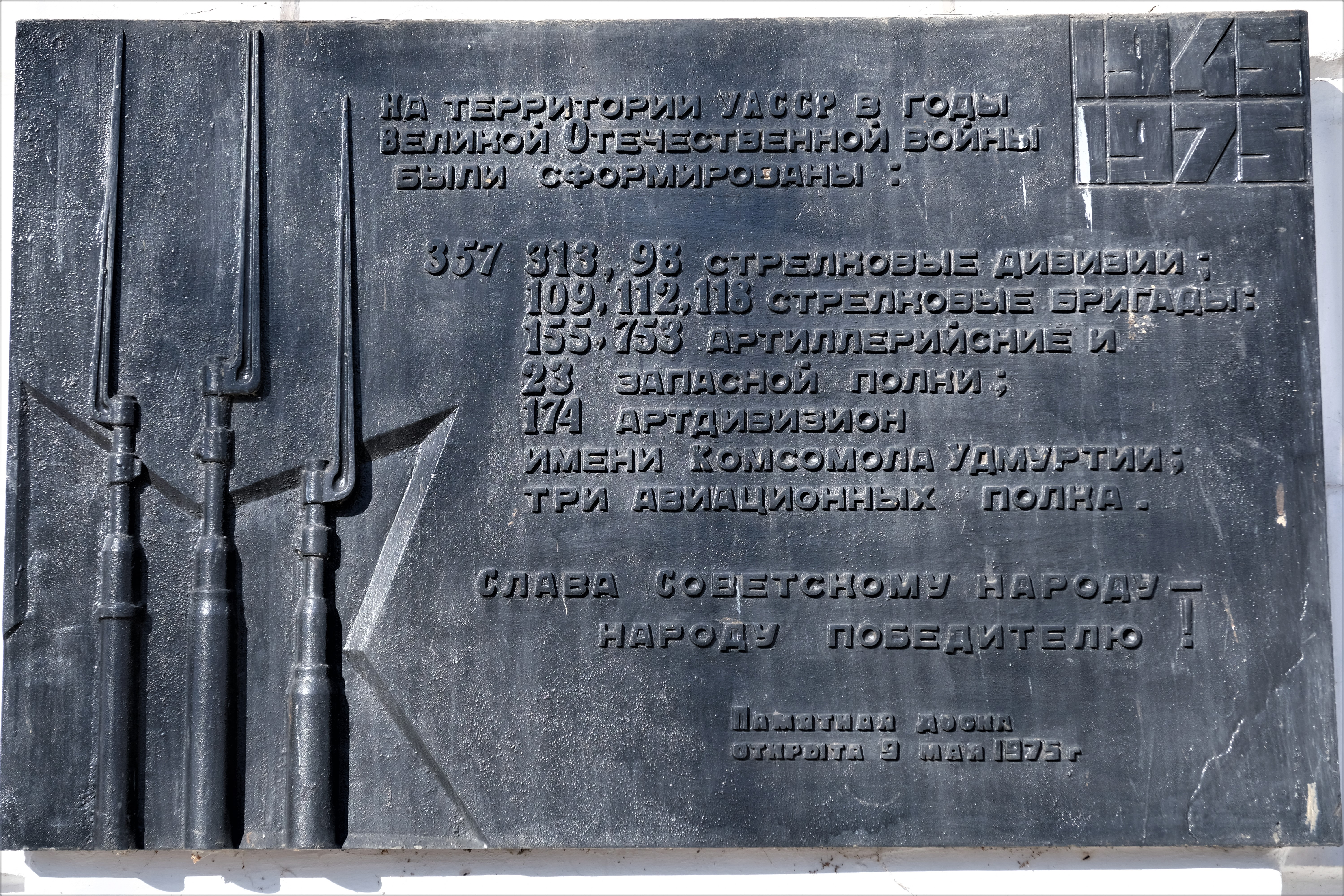 Памятная табличка на здании Арсенала